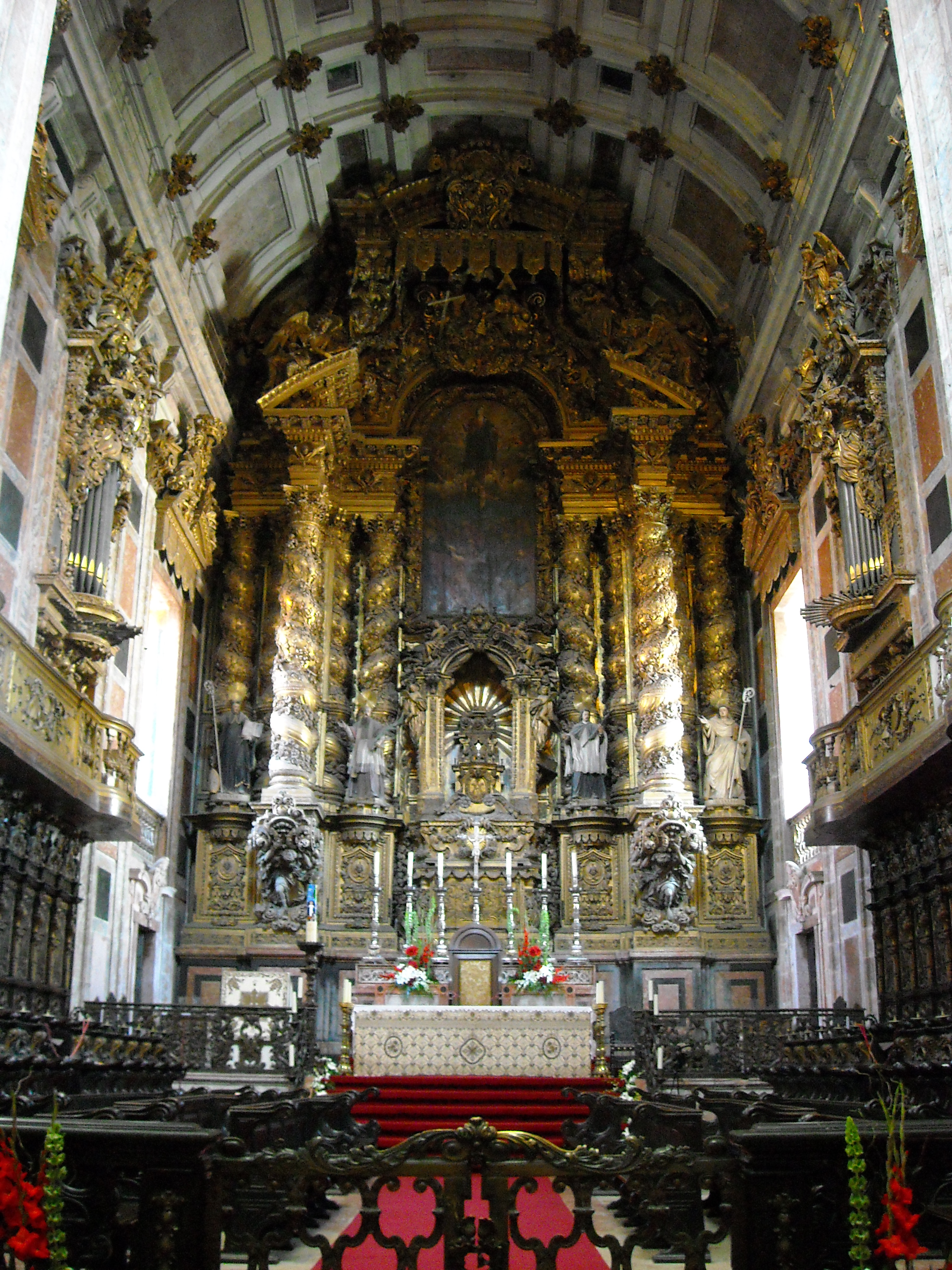 Altar-mor da Sé do Porto.